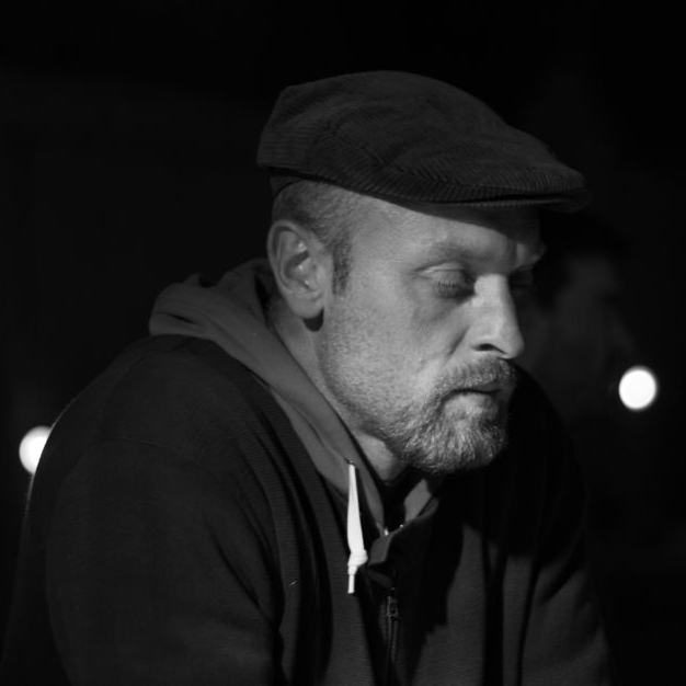 Portrait de Frédéric Keiff